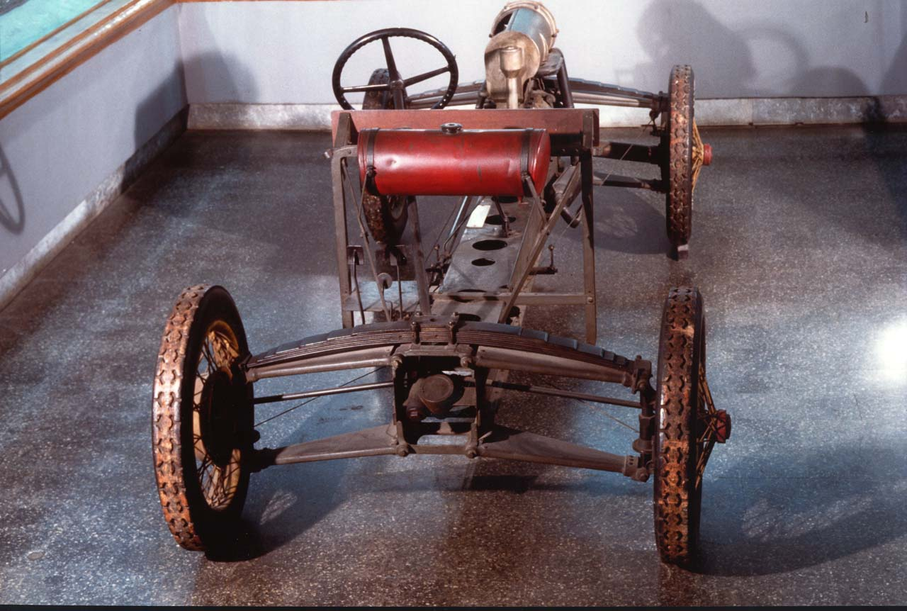 Autotelaio a trave unica centrale di sezione rettangolare con motore a 4 cilindri in linea, sistemato posteriormente. Il motore forma un blocco unico con la scatola del cambio a leva centrale e con il differenziale. Il raffreddamento del motore è ad aria forzata, ottenuta mediante un turboventilatore azionato da un albero verticale ed ingranaggi dall'albero motore. Il telaio poggia su quattro ruote con sospensioni indipendenti e balestre rovesciate trasversali. L'impianto frenante è costituito da freni a tamburo con comando meccanico. Notizie storico-critiche Lo chassis realizzato dalla San Giusto di Trieste venne presentato al Salone dell'Automobile di Milano, dove ottenne un buon riscontro, grazie alle innovazioni tecniche adottate come il telaio a trave unica e il sistema di raffreddamento del motore. Nonostante questo successo, la San Giusto non riuscì tuttavia ad imporsi sul mercato e già due anni dopo la propria fondazione, cessò la produzione. Oltre allo chassis conservato dal Museo Nazionale della Scienza e della Tecnologia "Leonardo da Vinci", un altro telaio si trova al Museo dell'Automobile di Torino.